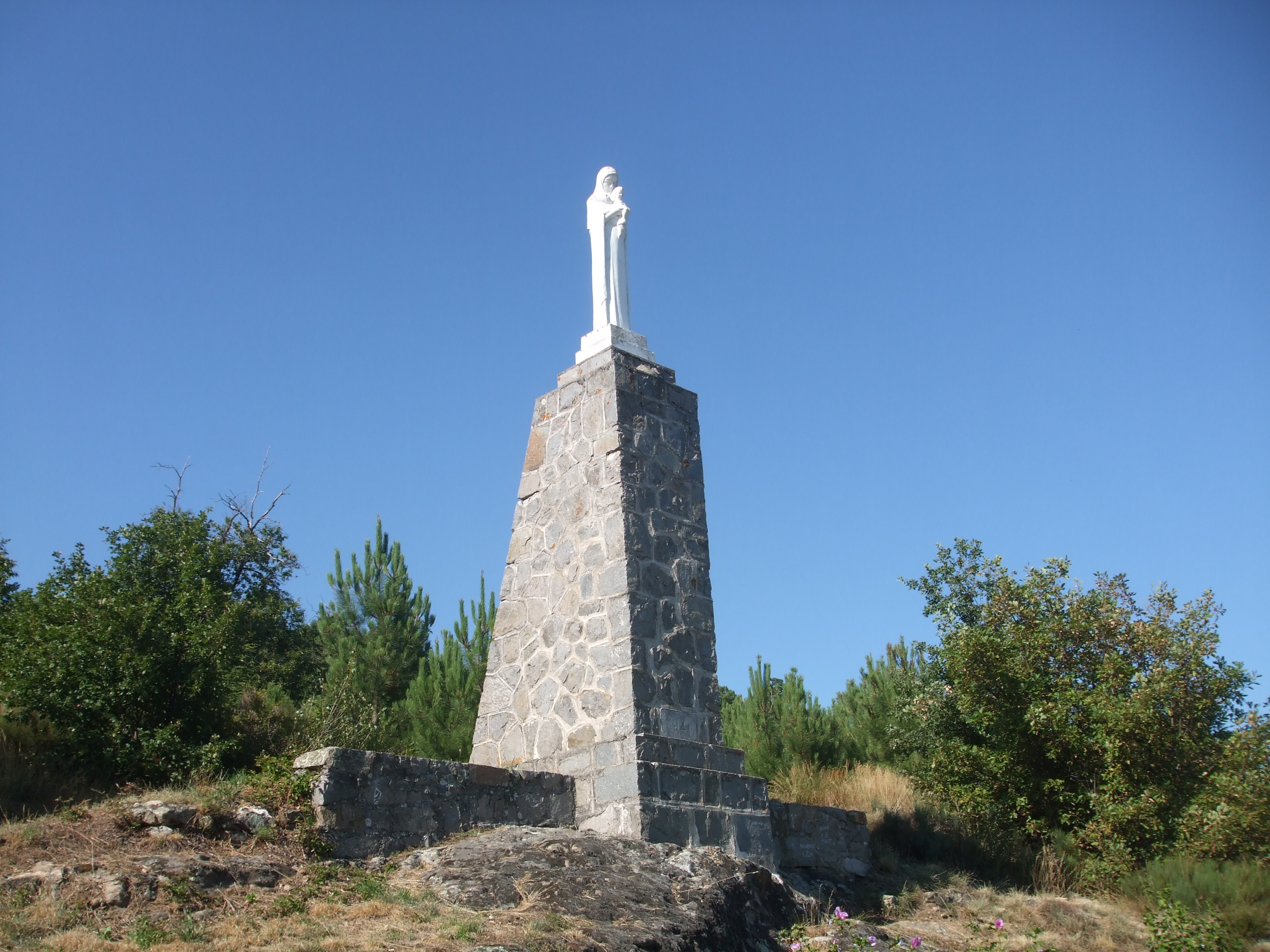 Madone sur la colline du Colombier à Boulieu-lès-Annonay (Ardèche)